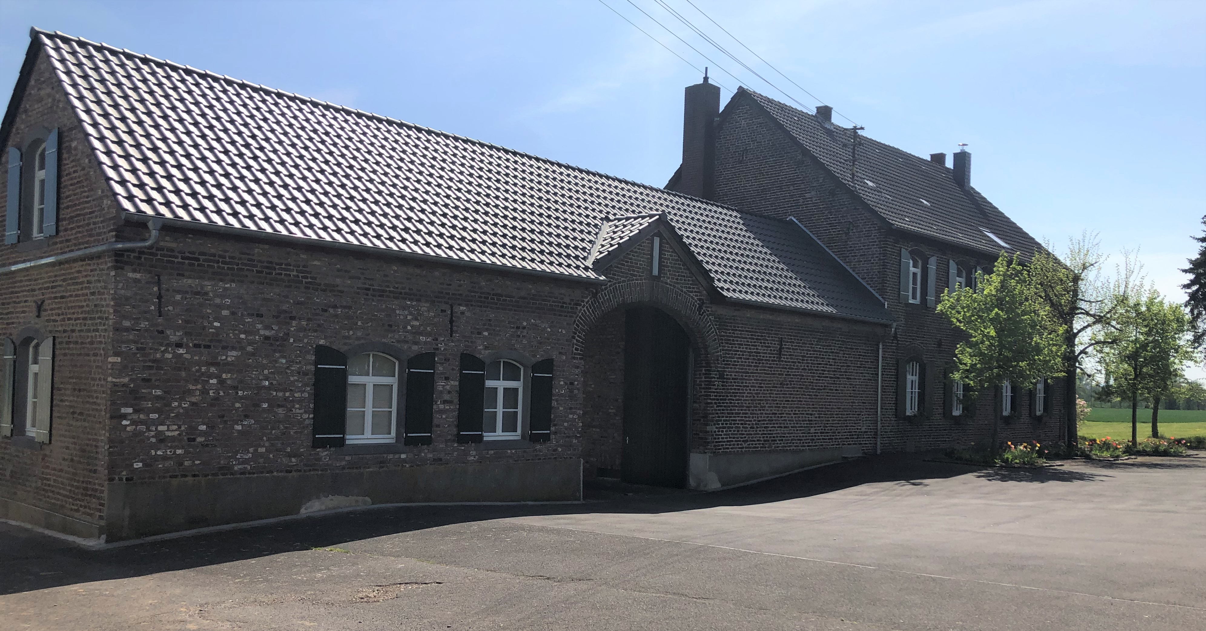 Gut Antoniterhof Frontansicht